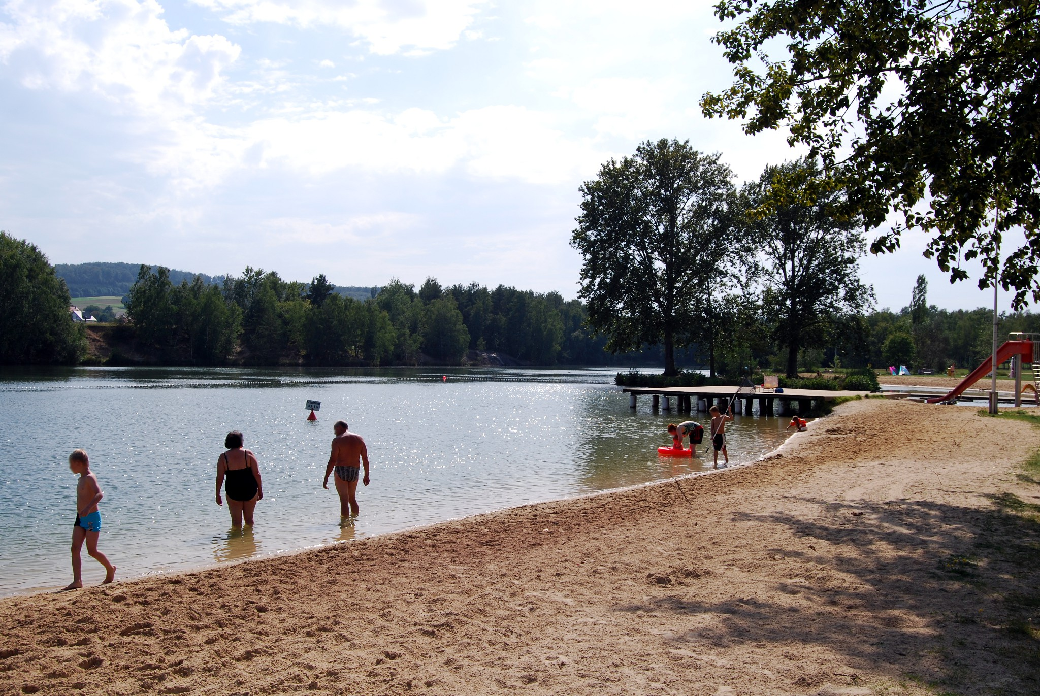 Sandstrand am Neuenhainer See (Gemeinde Neuental)